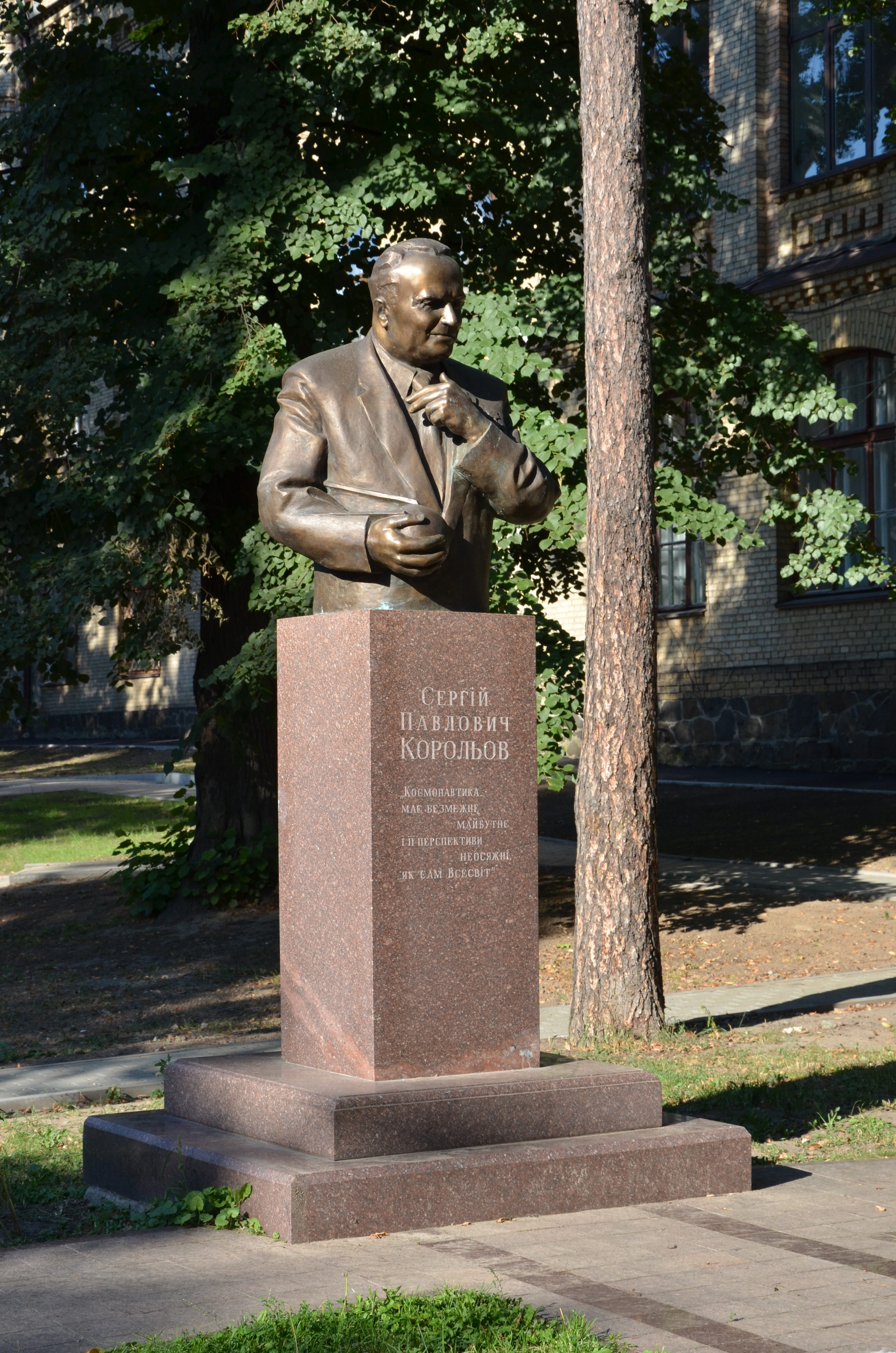 Пам'ятник С.П.Корольову в Києві, на території політехнічного інституту